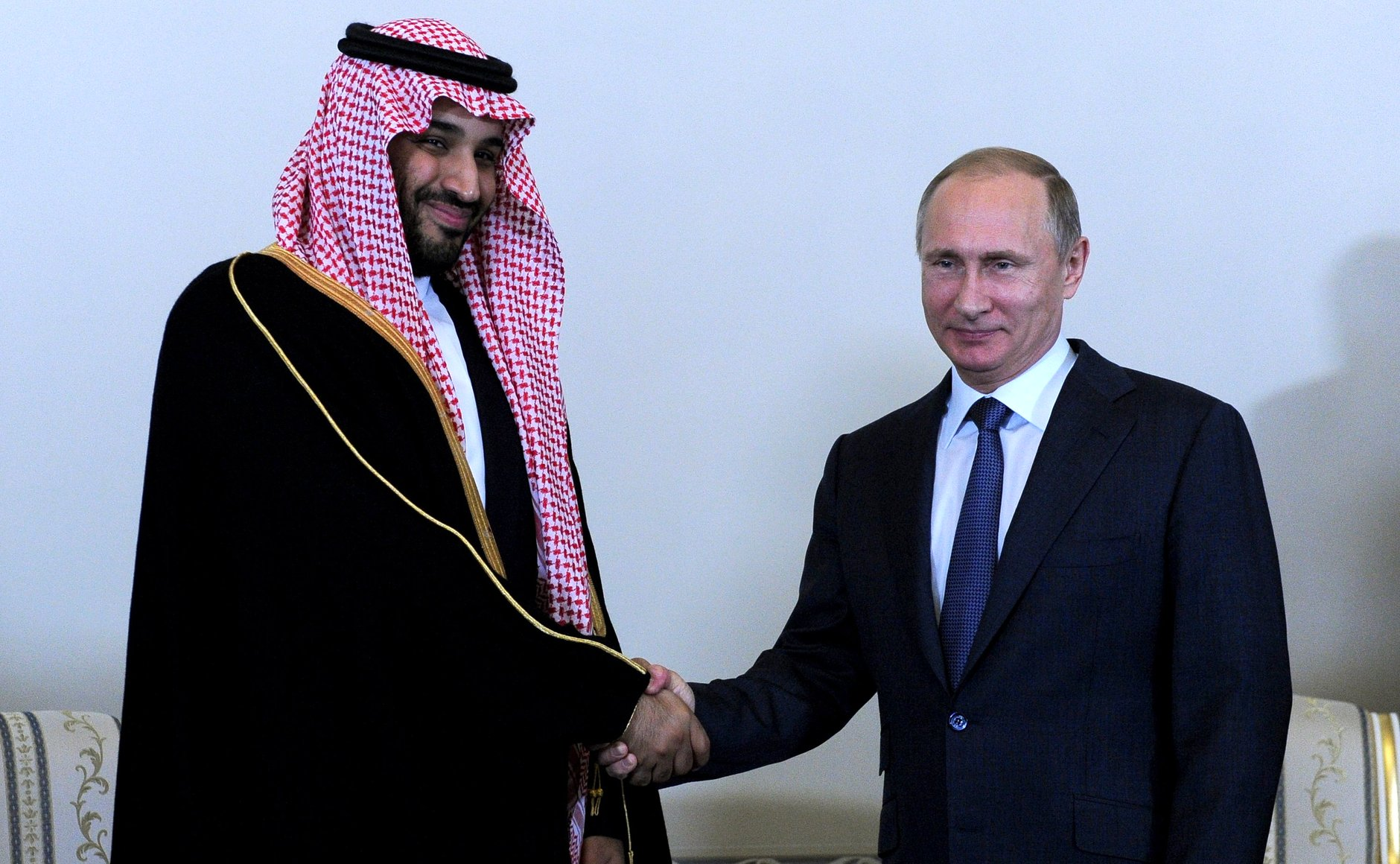 Встреча Президента России Владимира Путина с заместителем Наследного принца, Министром обороны Саудовской Аравии Мухаммедом бен Сальманом